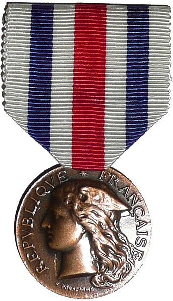 Médaille d'Honneur du Service de Santé des Armées